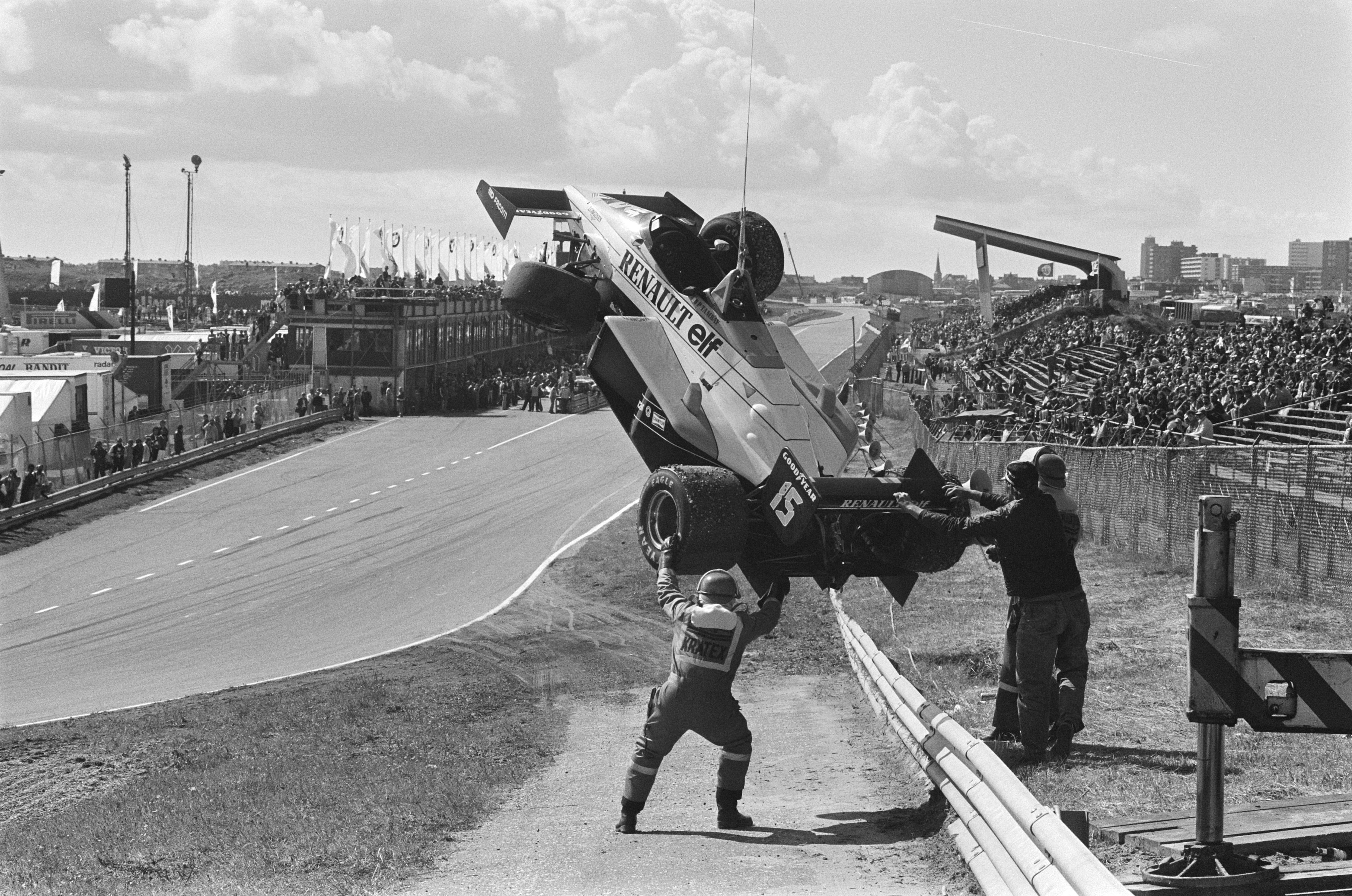 Grote Prijs van Nederland Formule I op Zandvoort; auto's in de pits.